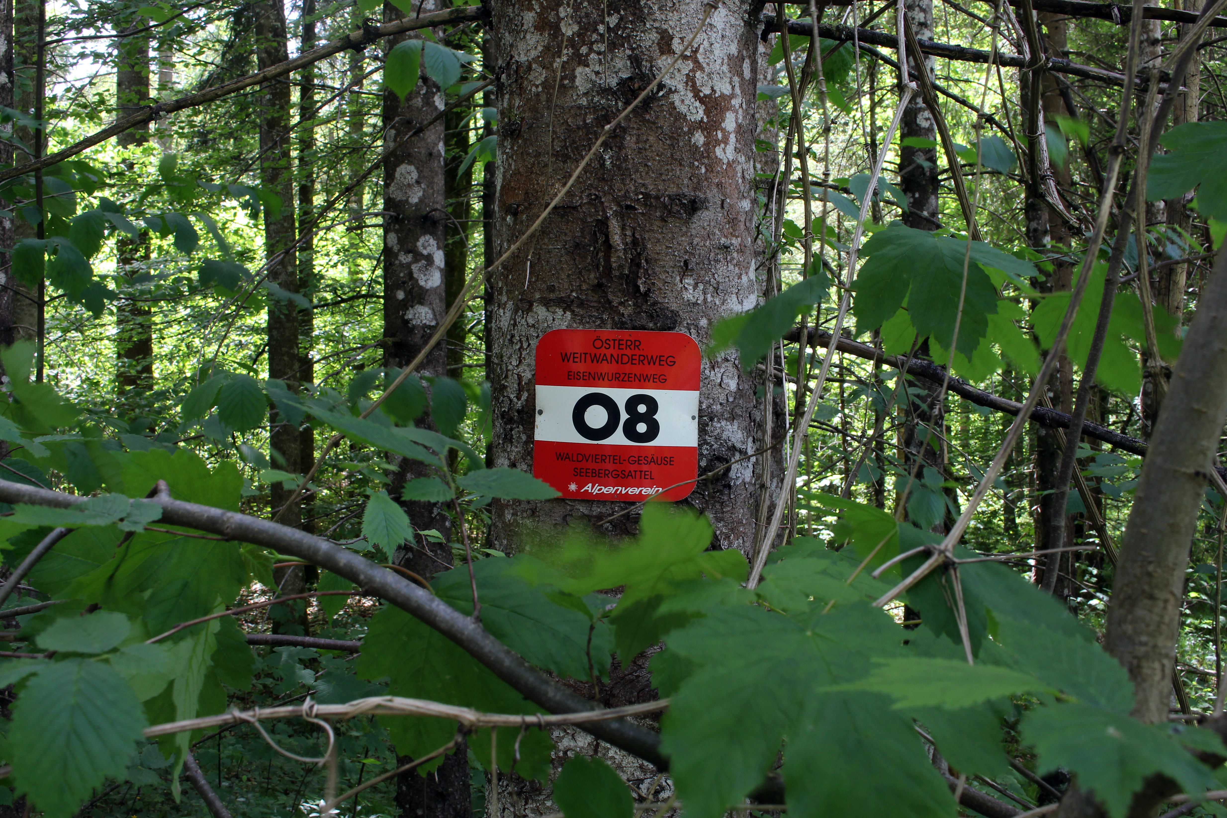 Wegmarkierung des Weitwanderwegs 08, "Eisenwurzenweg", im Nationalpark Gesäuse This file shows the National Park Gesäuse in Austria.